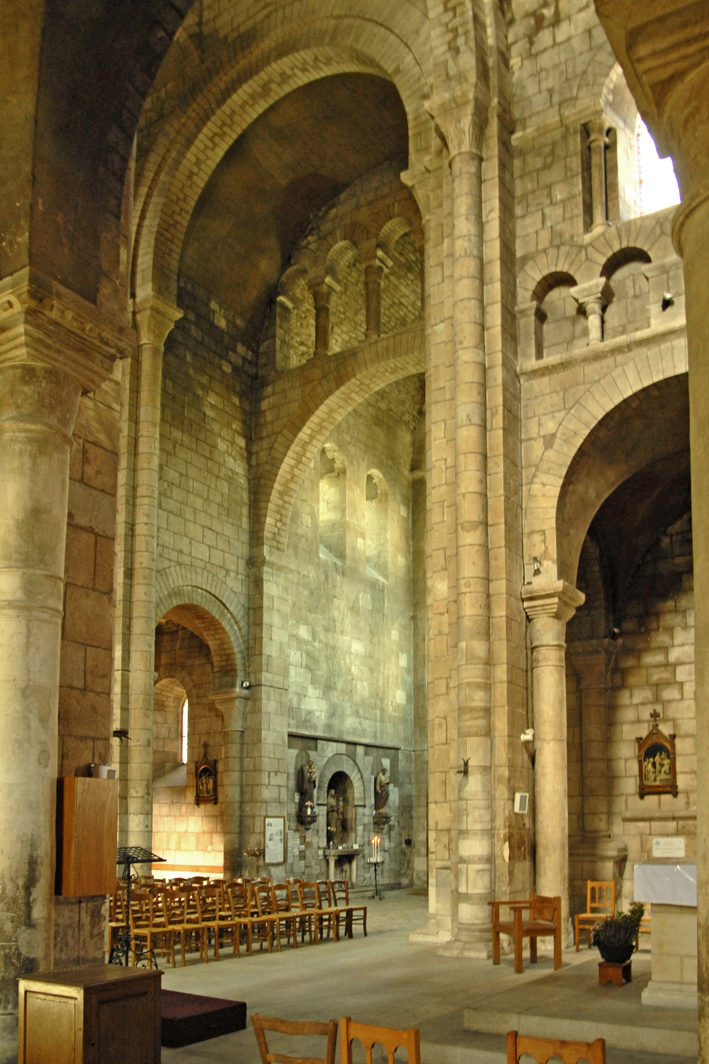 St.-Etienne Nevers, Fassade